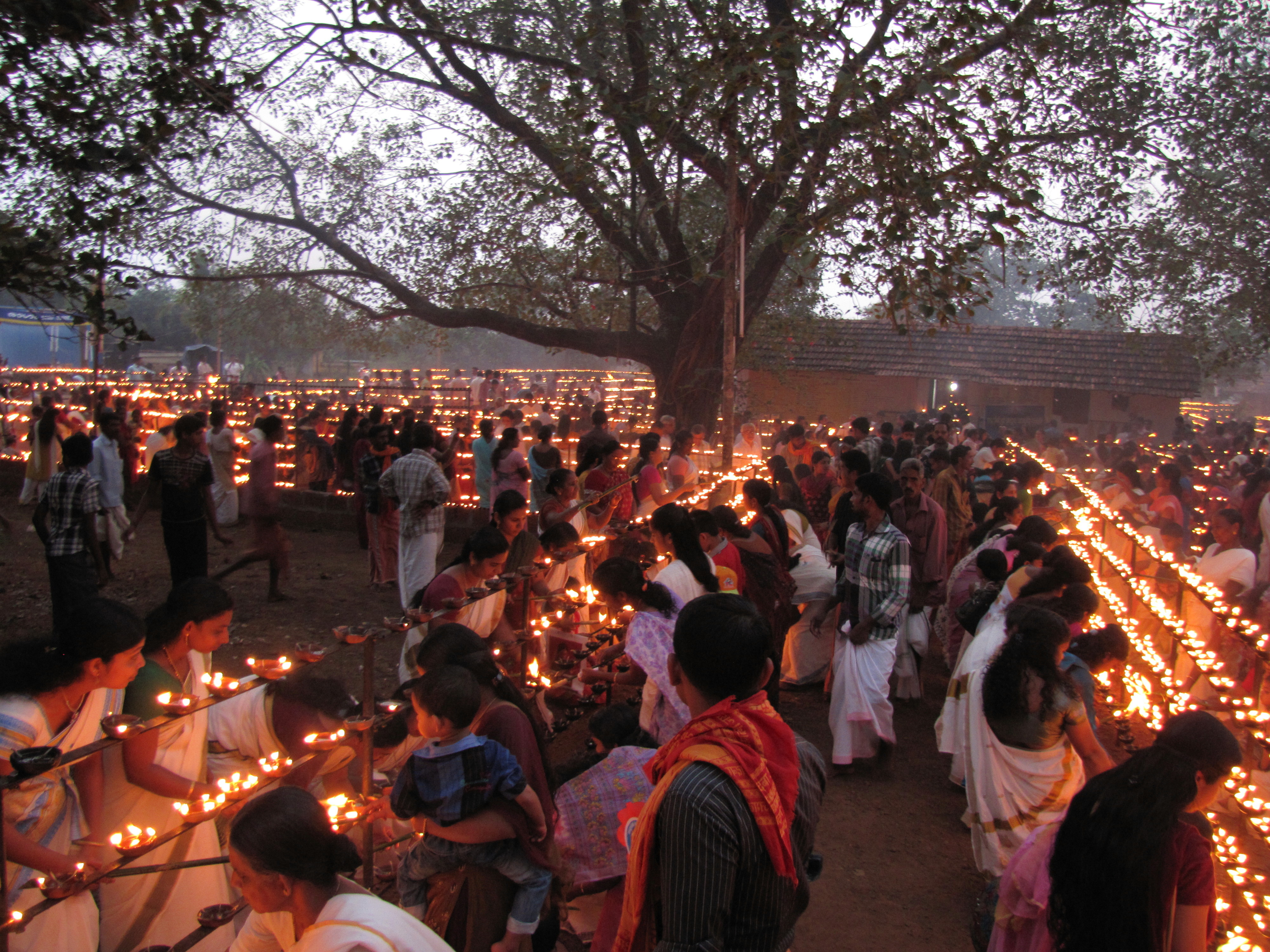 Laksham Deepam at Ayyappa Vanadurga Temple, Naduvil